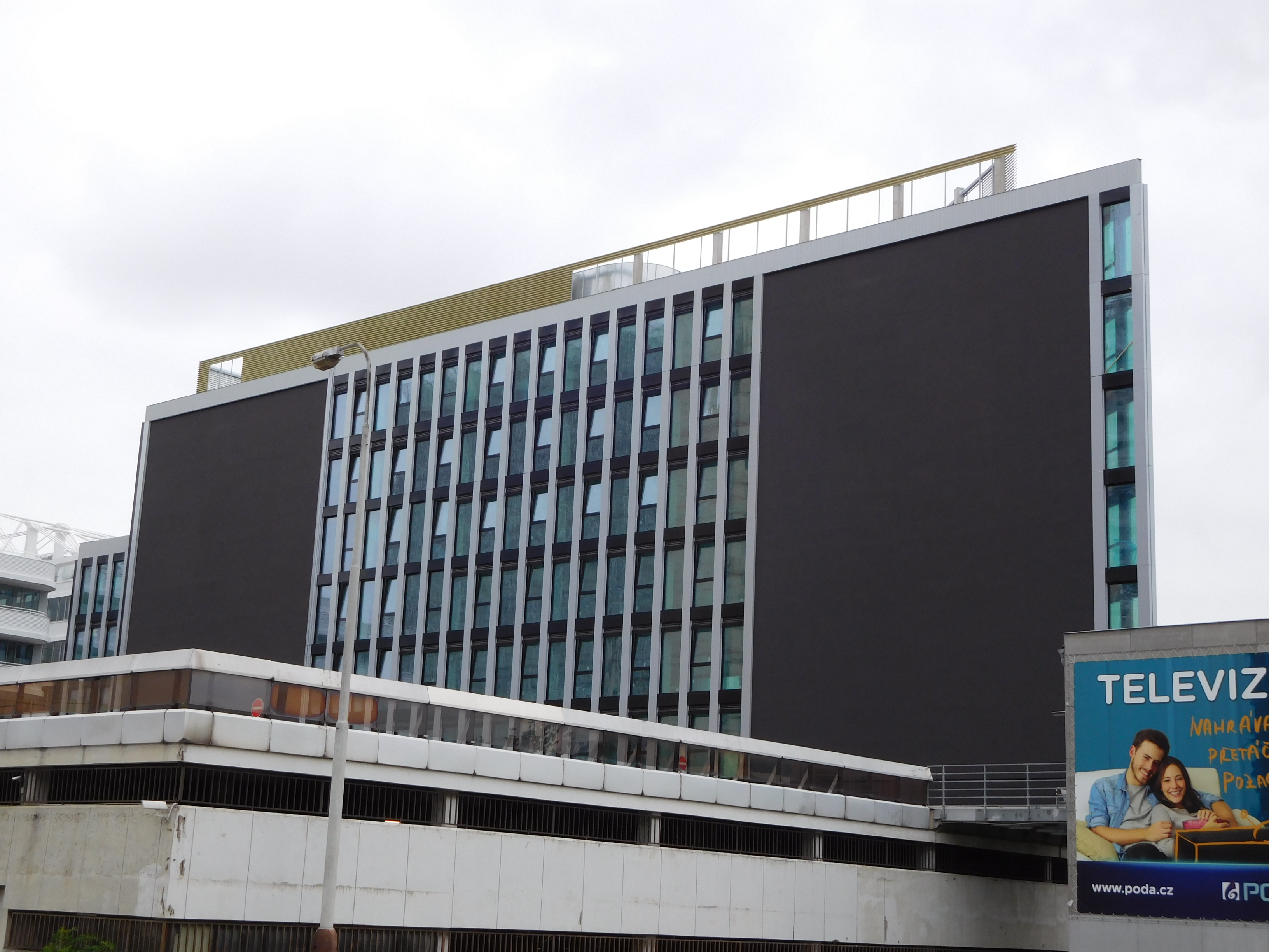 Praha - Krč, Na Strži/Milevská - stavba City Element, v popředí garáže City Empiria